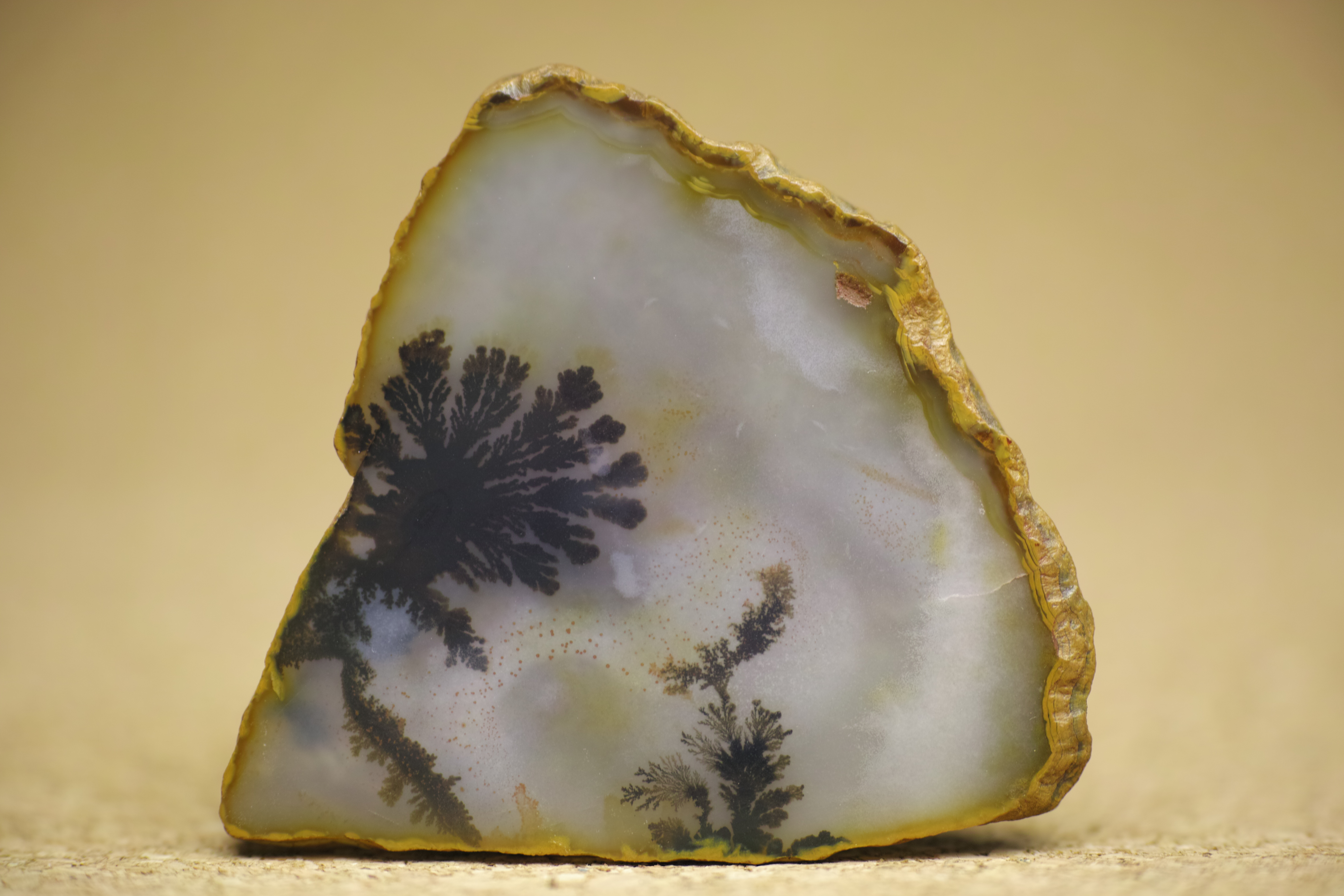 Dendritic Agate from Ken River, Bundelkhand Region, India